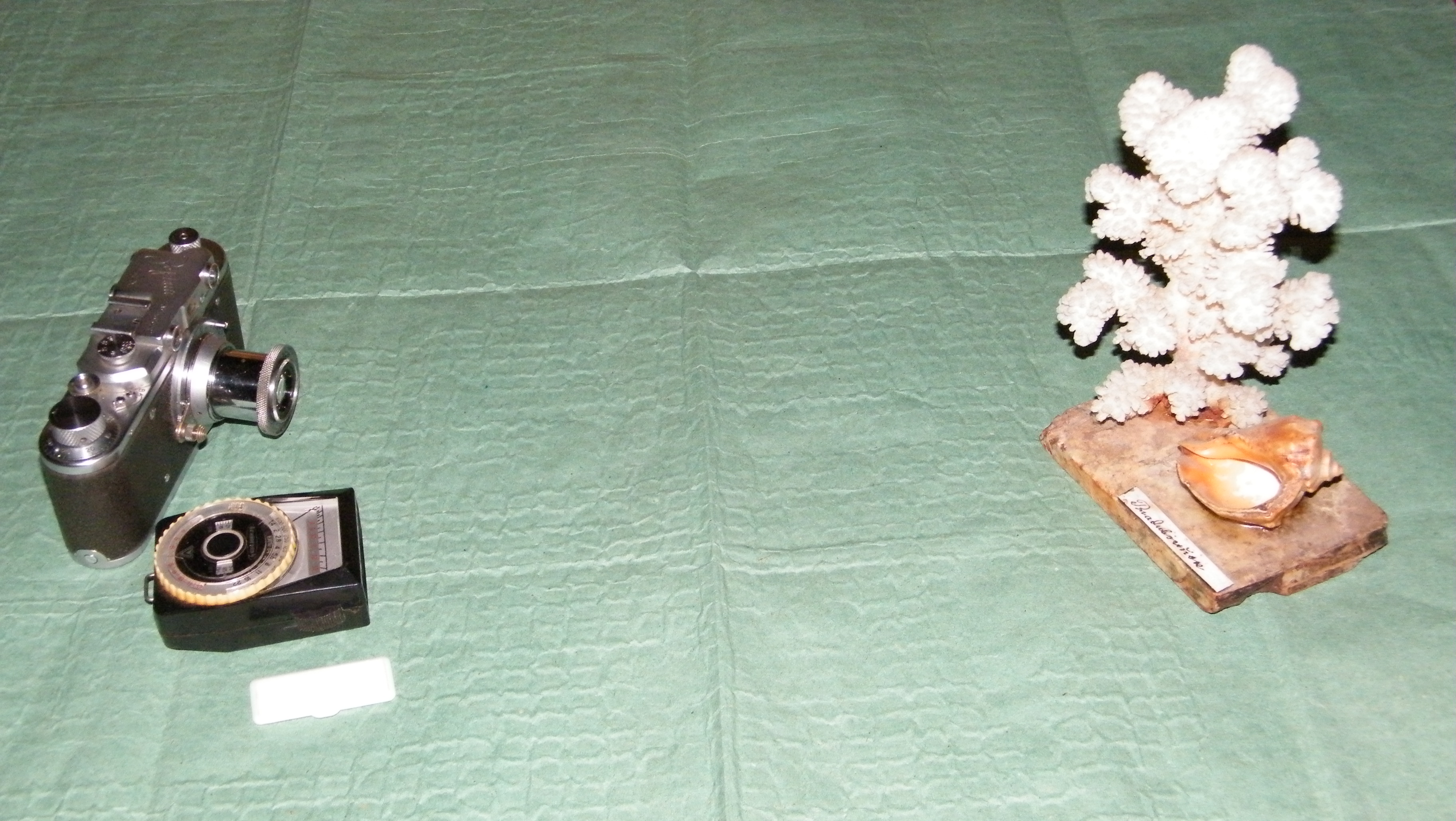 Экспонометрия по яркости